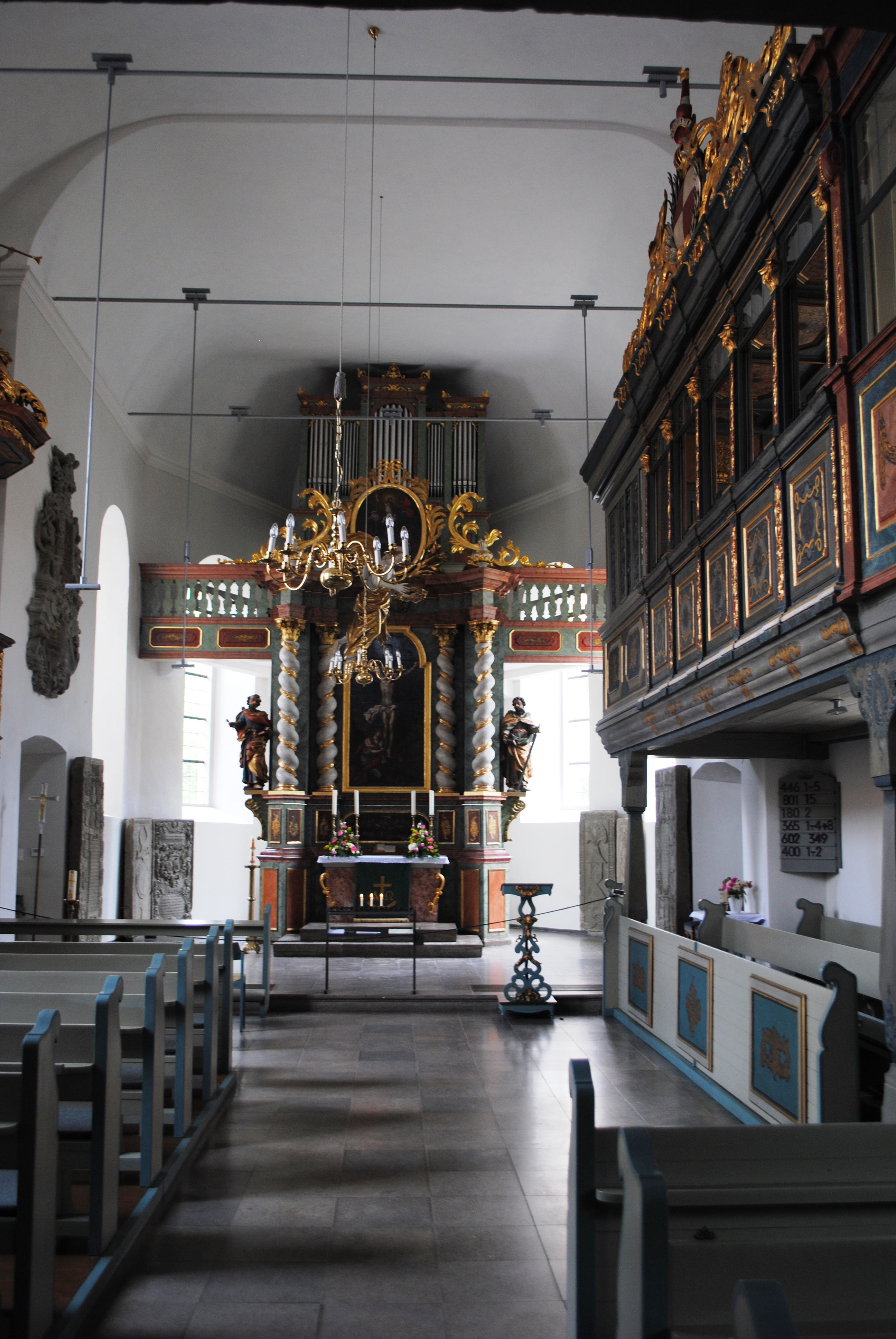 Innenraum, Kirche, RüdenhausenThis is a photograph of an architectural monument.